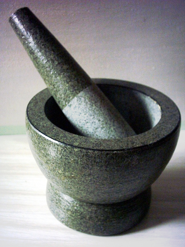 Kalou réunionnais